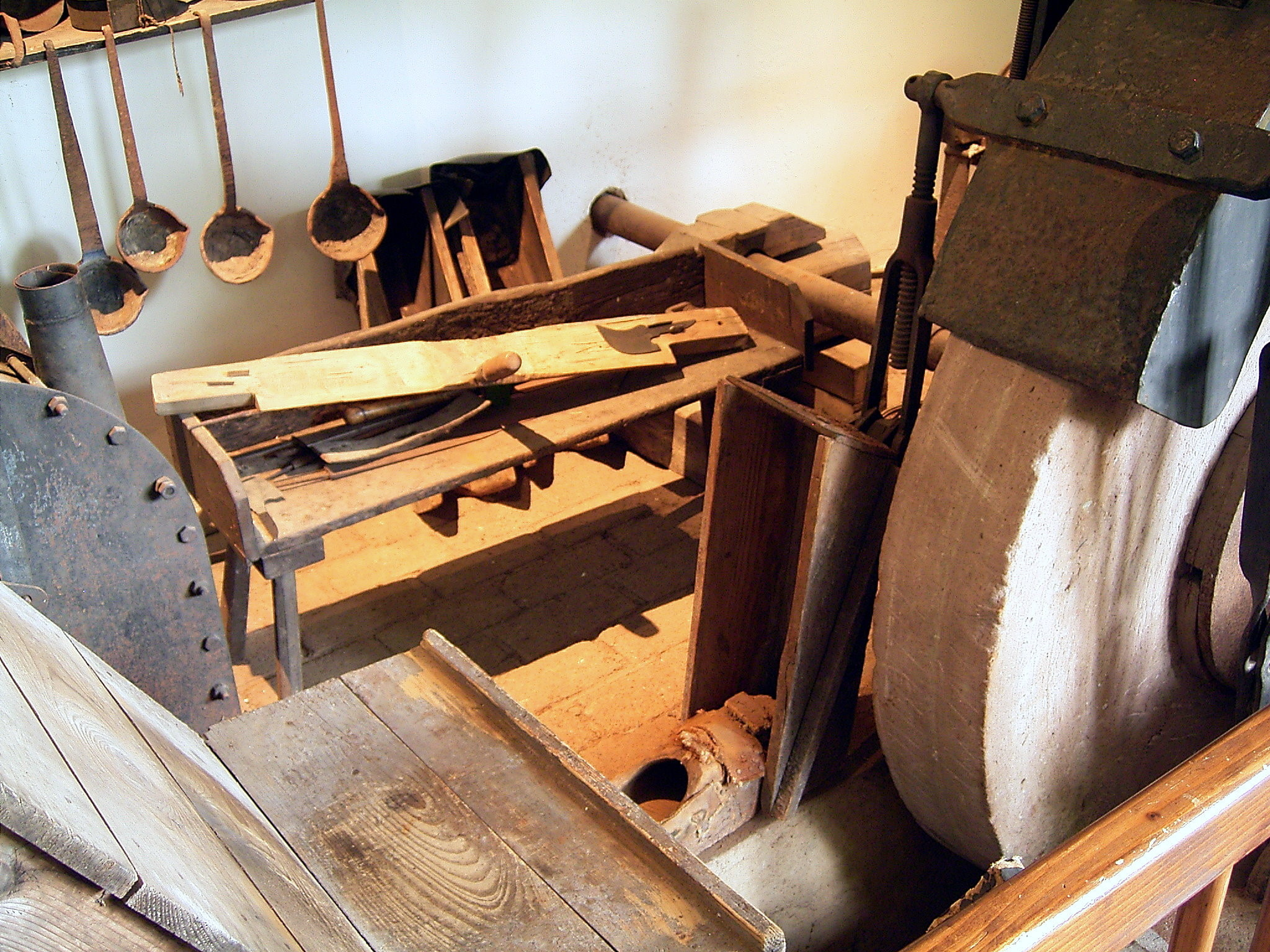 Balkhauser Kotten in Solingen